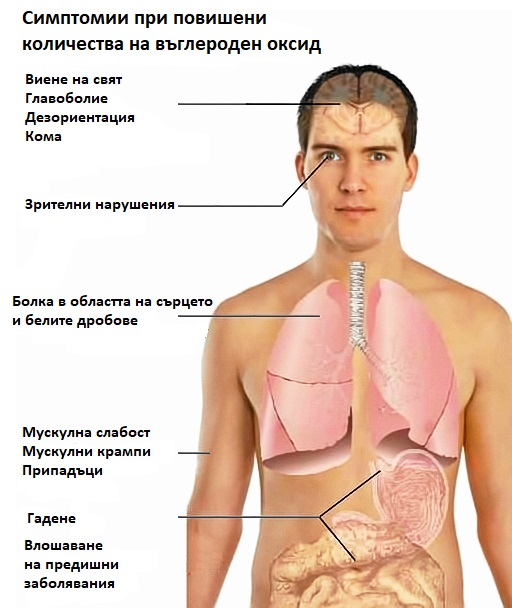 Симптомии при повишени количества на въглероден оксид (CO).